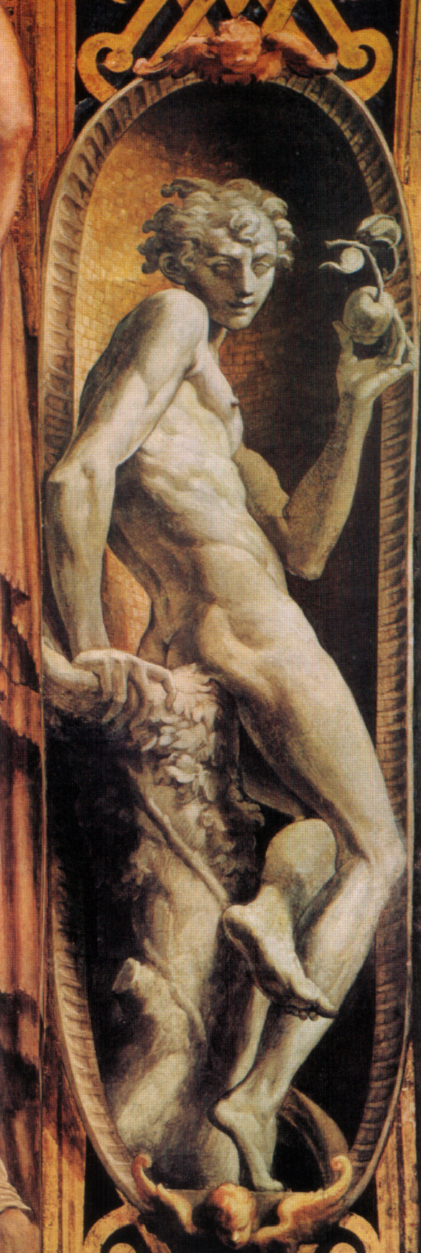 detail